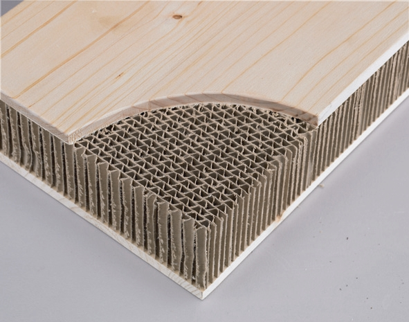 Naturholzwabenplatte